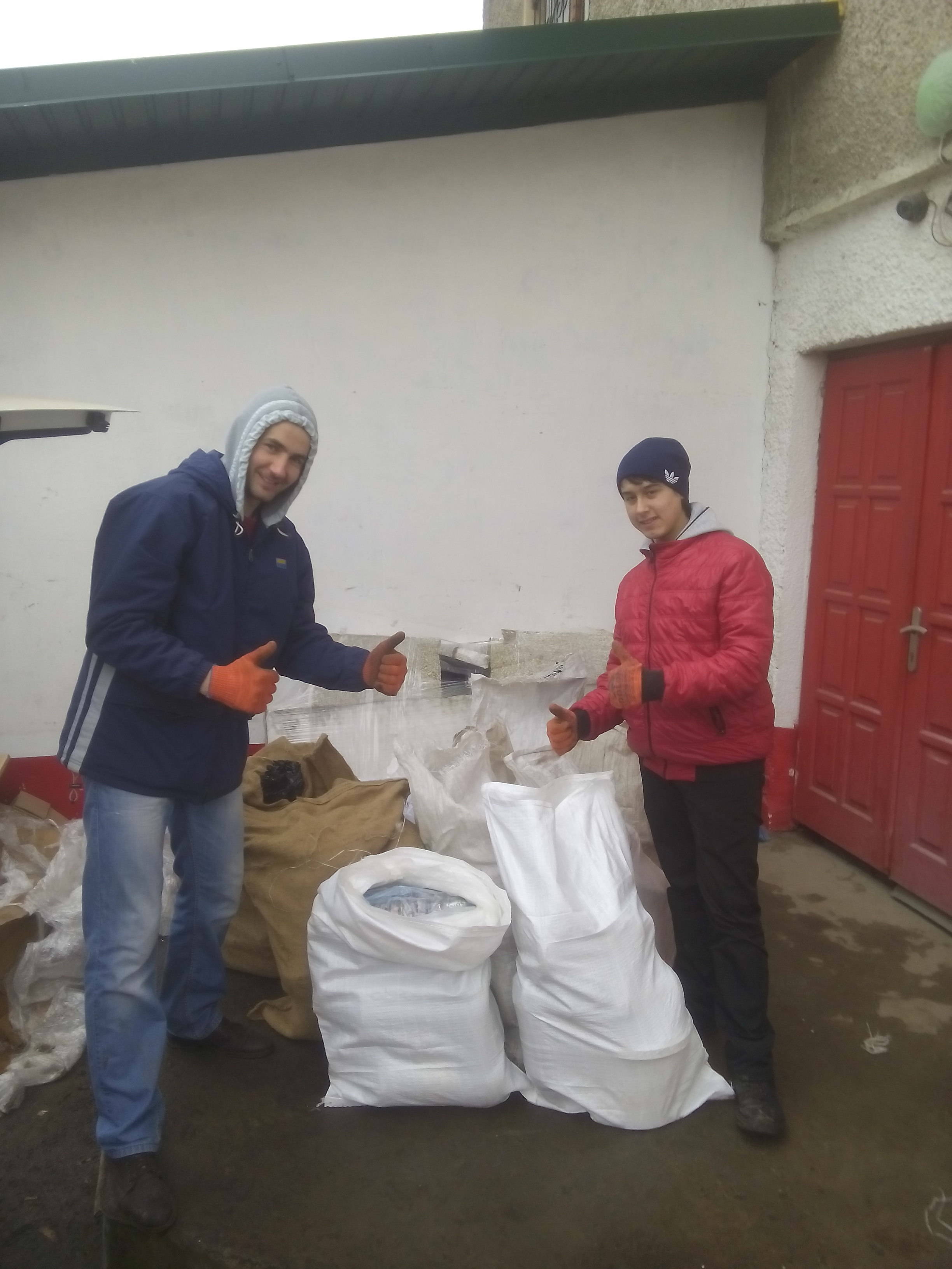 Праворуч Олег Скожець, ліворуч Олег Окіпний, обоє активісти Еко руху Бучач